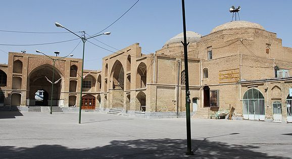 نمایی از مسجد سرخ ساوه و گنبد آن - شهریور ۱۳۹۲